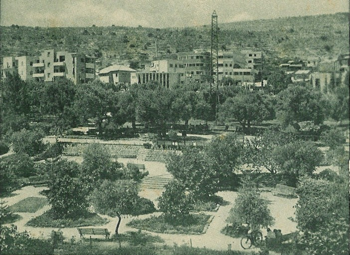 גן בנימין ב-1933